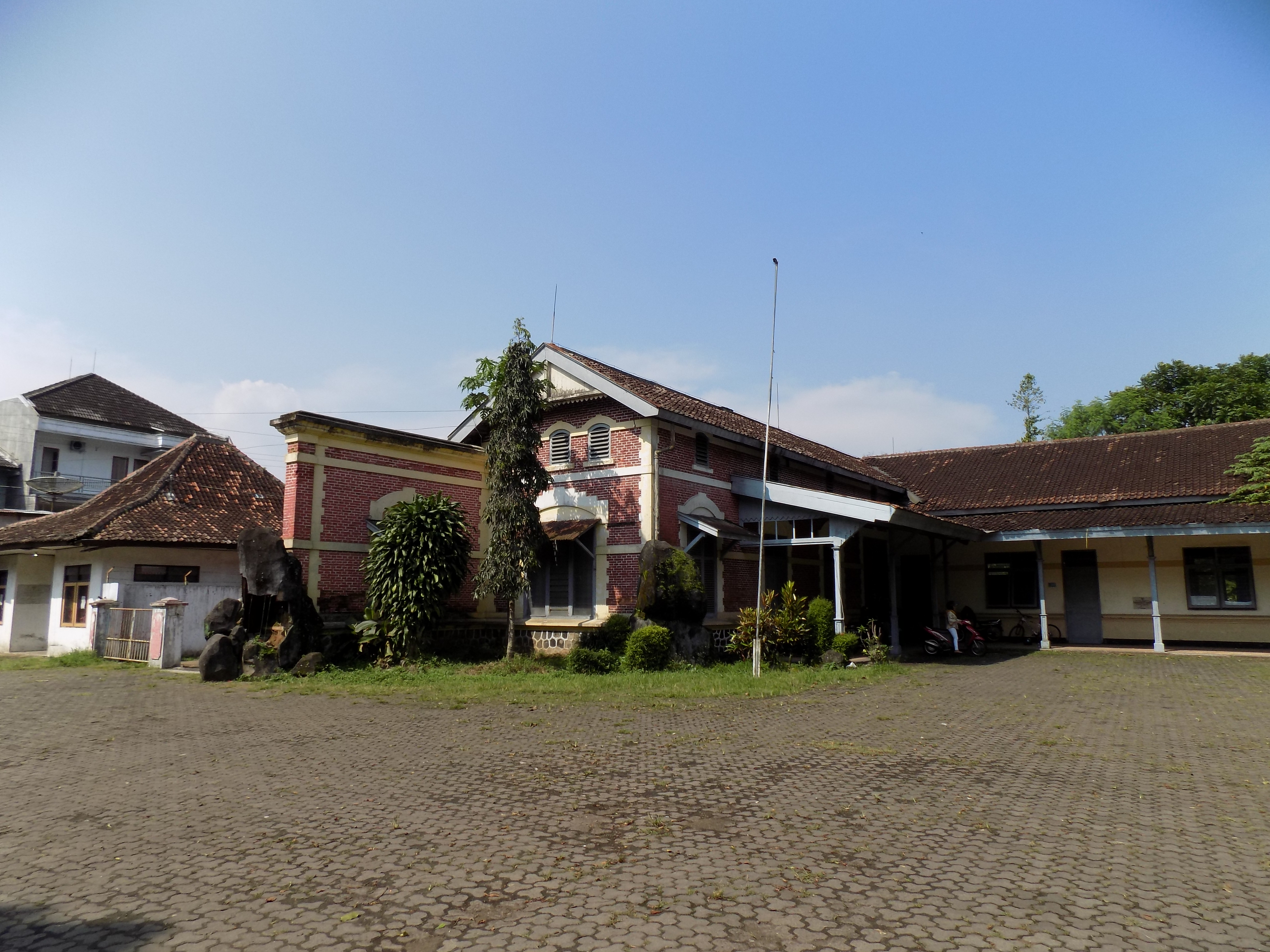 Stasiun Temanggung